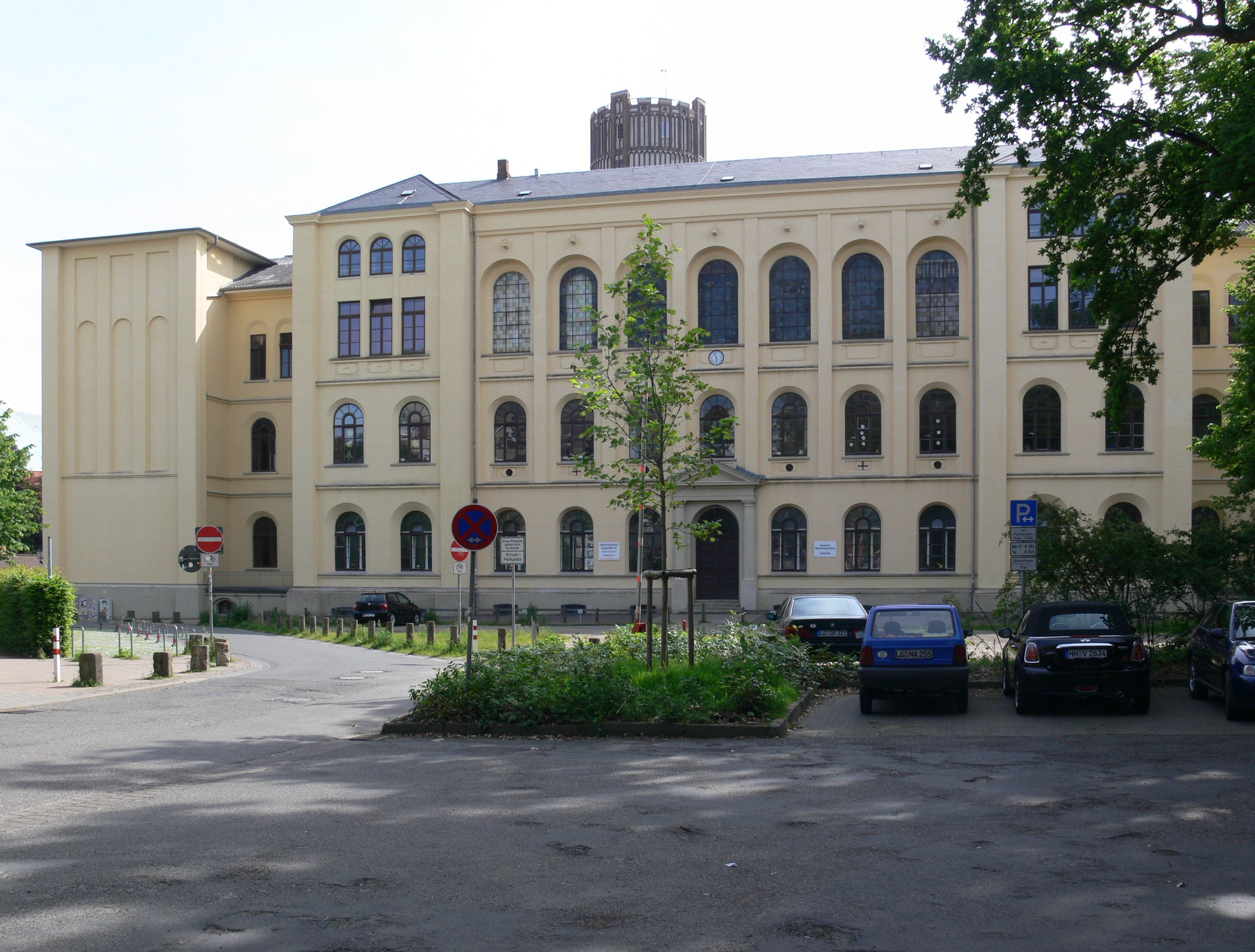 Schulgebäude der Hauptschule Stadtmitte in der Haagestraße (früher: Am Roten Wall) in Lüneburg in Niedersachsen, Deutschland. Das 1872 fertiggestellte Gebäude wurde von 1872–1978 vom Johanneum genutzt, diente während des Zweiten Weltkriegs zeitweise als Lazarett und wurde von 1945–1949 von der Wilhelm-Raabe-Schule als Ausweichquartier mitgenutzt. Über dem Gebäudefirst ist der Kopf des Lüneburger Wasserturms sichtbar.